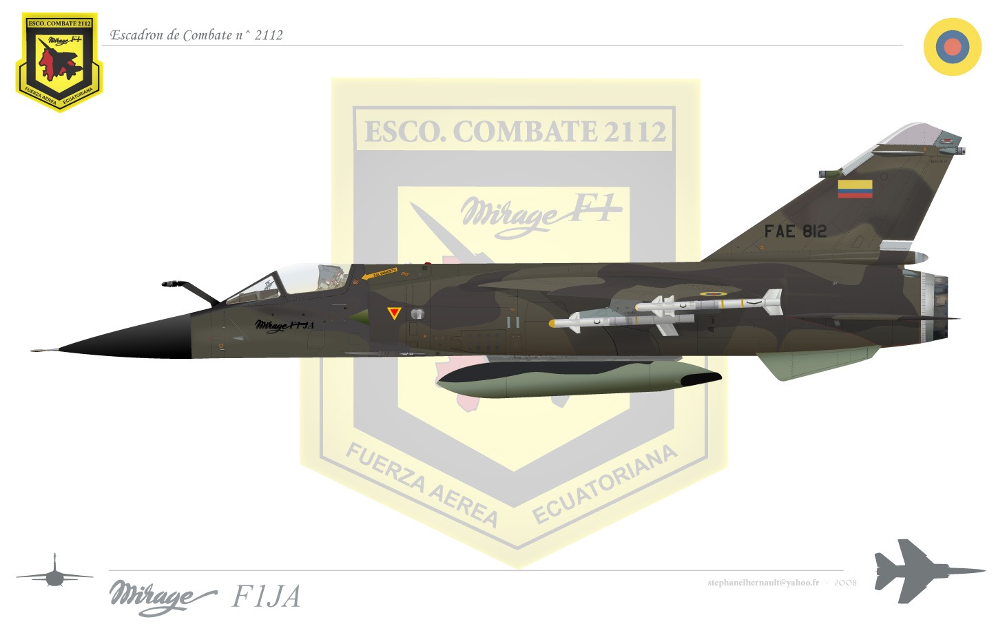 Mirage F1 JA Force aérienne Equatorienne